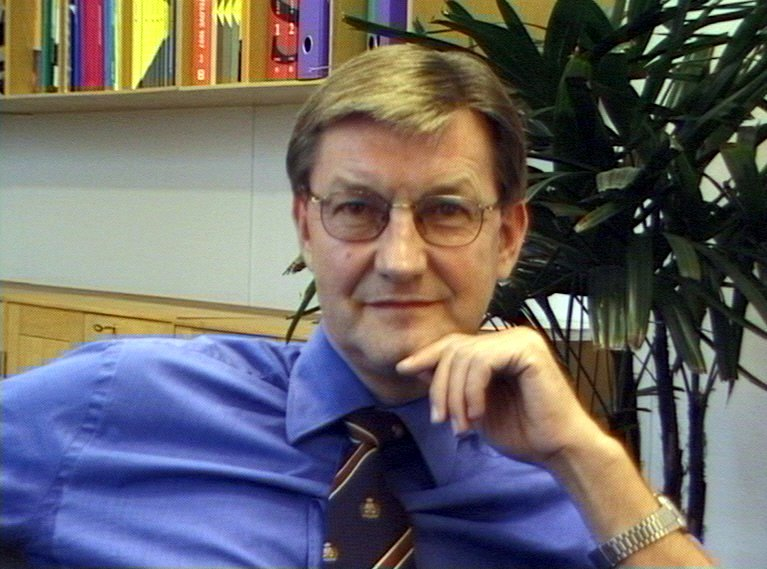 Tidligere skatteminister og senere erhvervsminister Ole Stavad